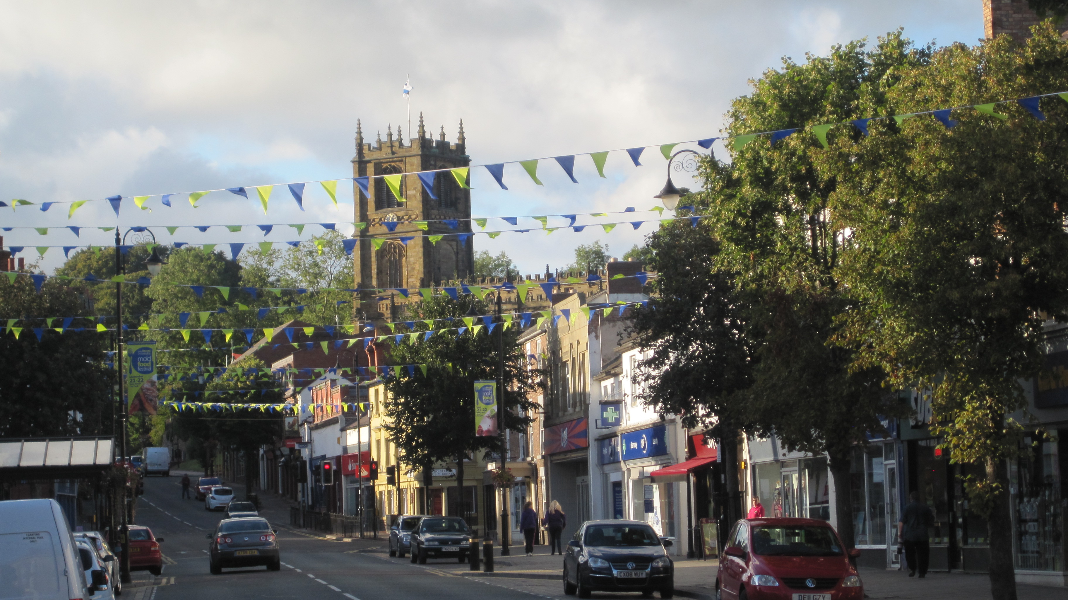 Y Stryd Fawr, gyda'r eglwys yn y cefn.